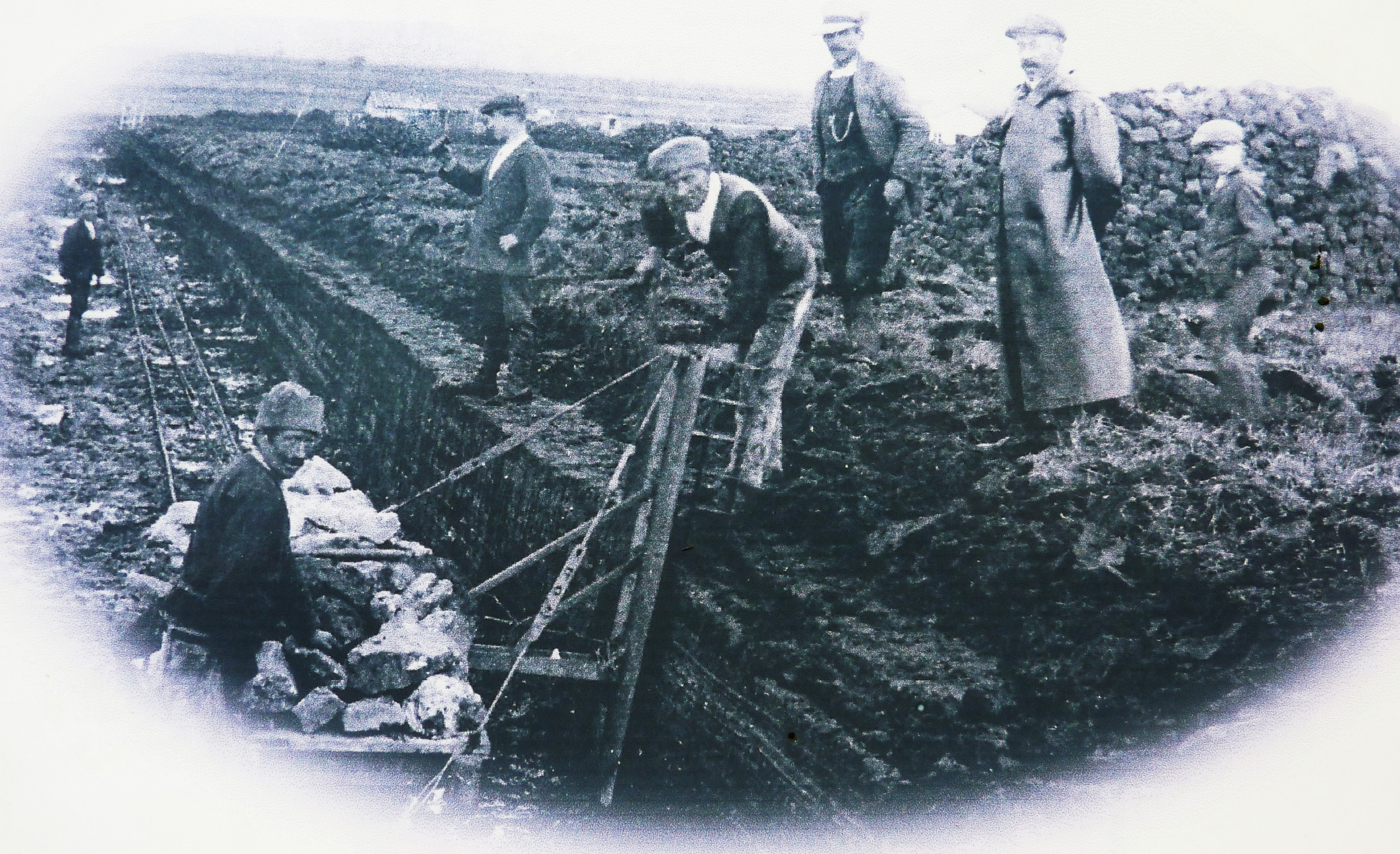 Tourbière du Yeun Elez exploitation industrielle au louchet mécanique (début XXe siècle)